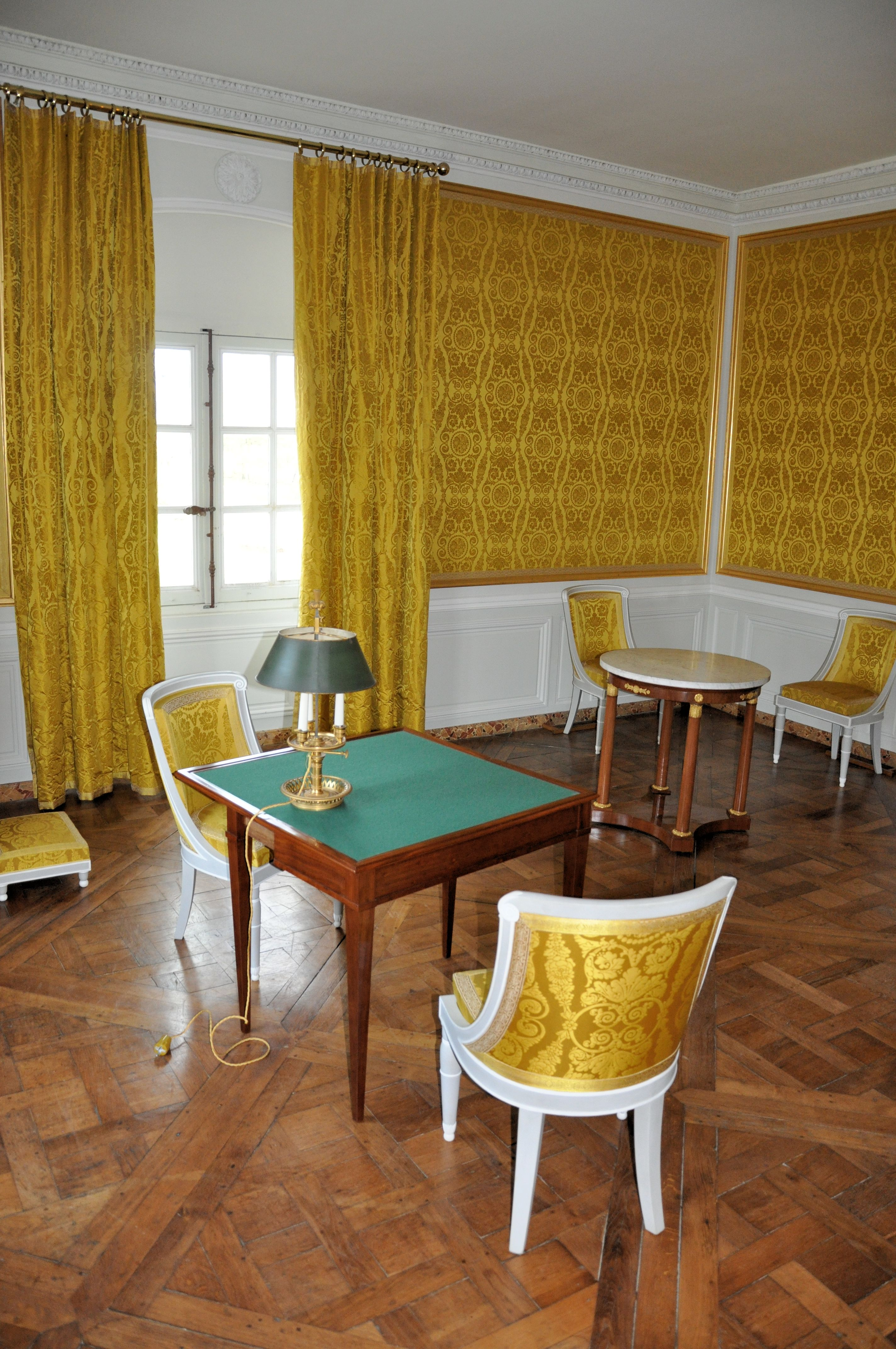 Petit Trianon - Attique - Salle évoquant le cabinet de toilette